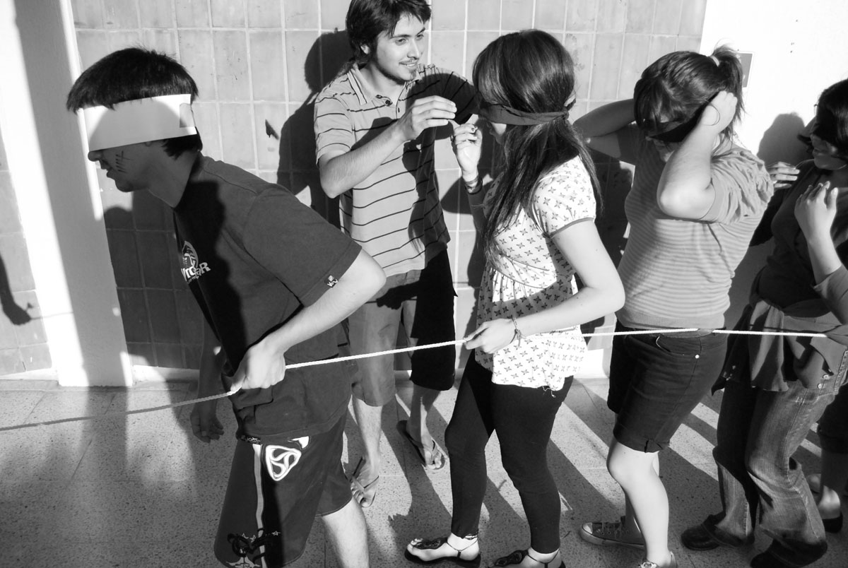 Mechoneo en la carrera de Diseño de la Universidad de Talca.